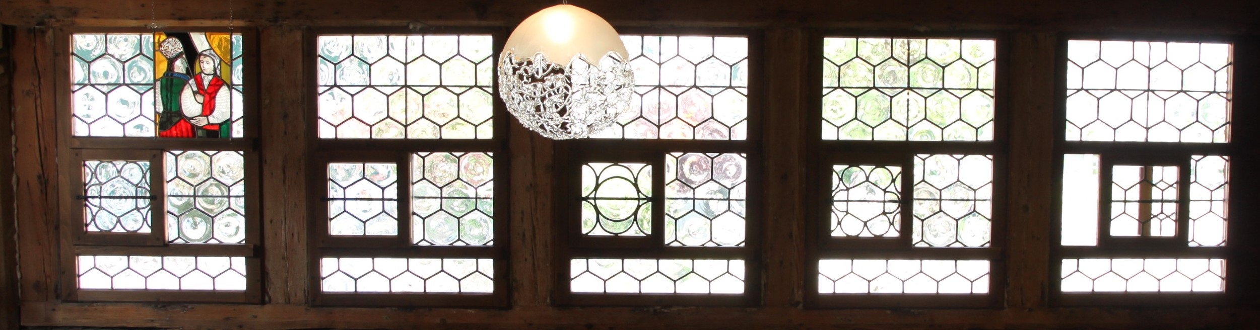 5teilige Fensterreihe mit wabenförmiger Bleiverglasung, Sprossen und Schieber im sogenannten Sigristenhaus, heute Sensler Museum in Tafers/Schweiz